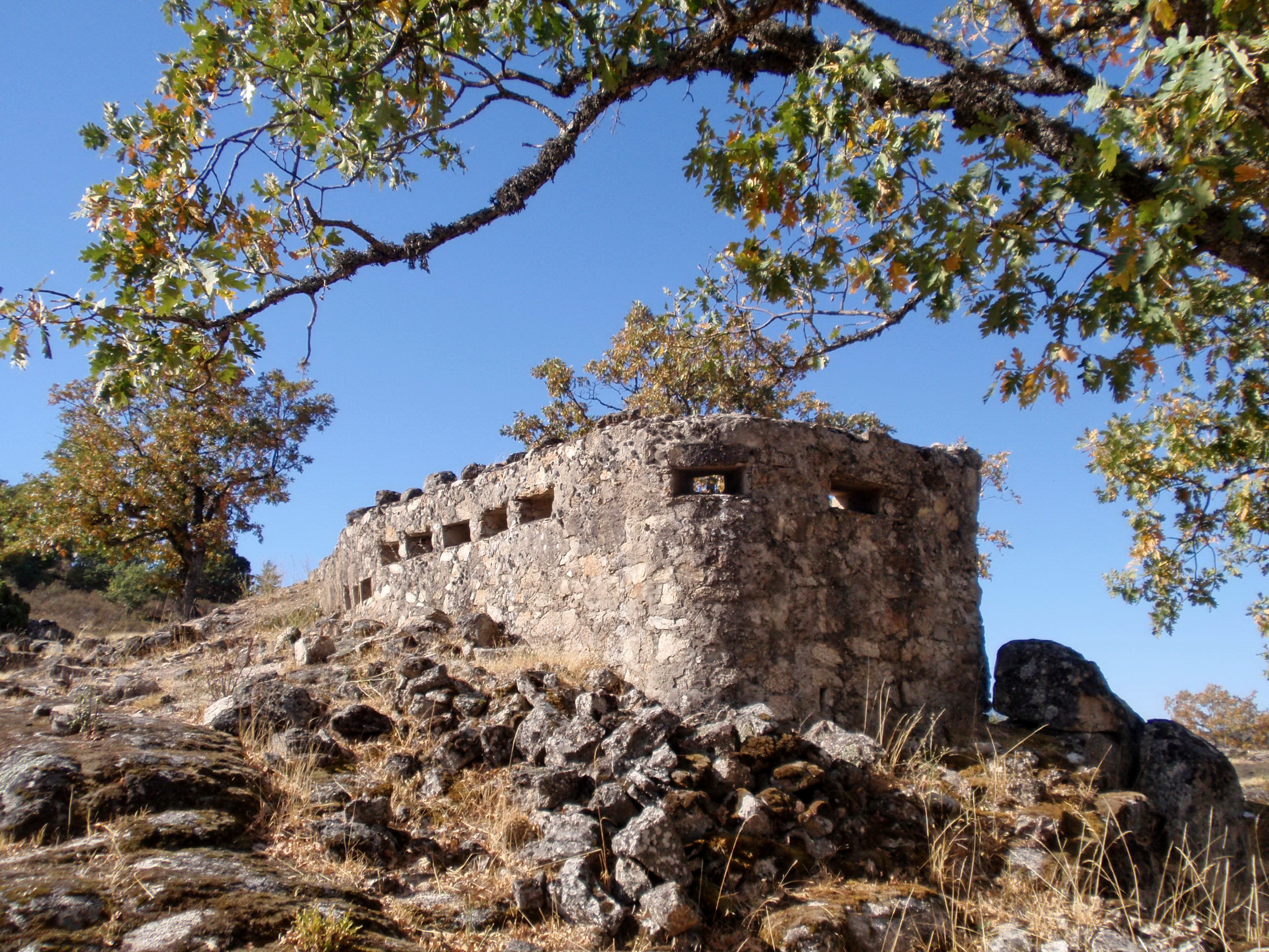 Bunker situado en el Cerro del Puerco (Valsaín) durante la Guerra Civil Española.